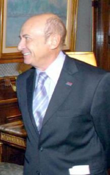 Casa Rosada,Despacho Presidencial - El presidente de la Nación, Néstor Kirchner, junto a los empresarios supermercadistas, Horst Paullman y Alfredo Coto.